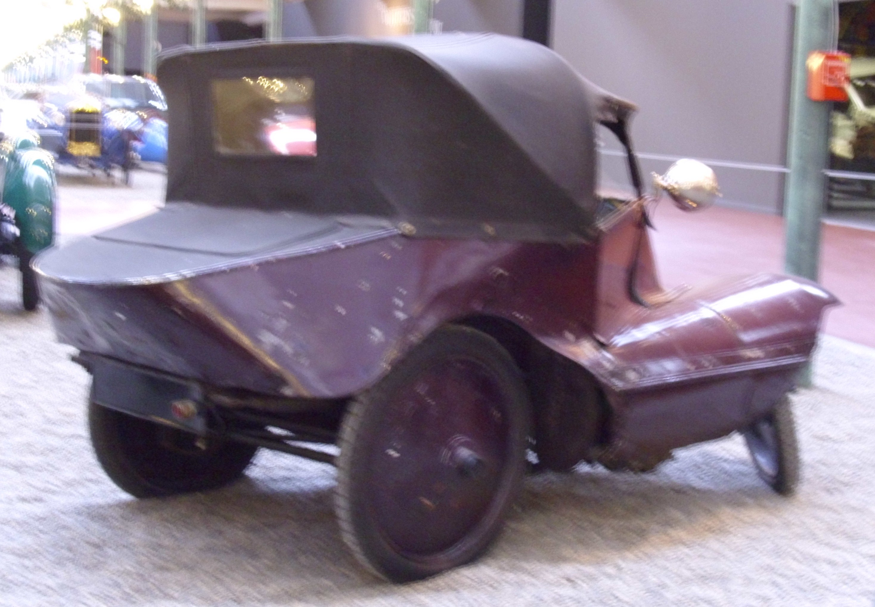 Scott Sociable von 1923 im Musée National de l'Automobile in Mulhouse.